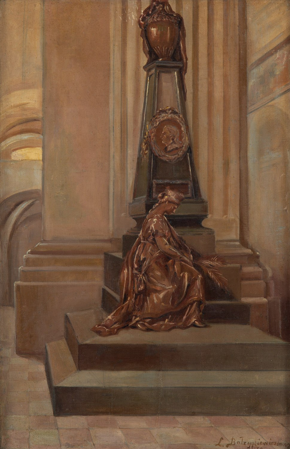 «Помнік Тызенгаўзу ў фарным касцёле ў Гродне». 1913 г. Прыватная ўласнасць.